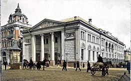 Фондовая биржа на Ильинке